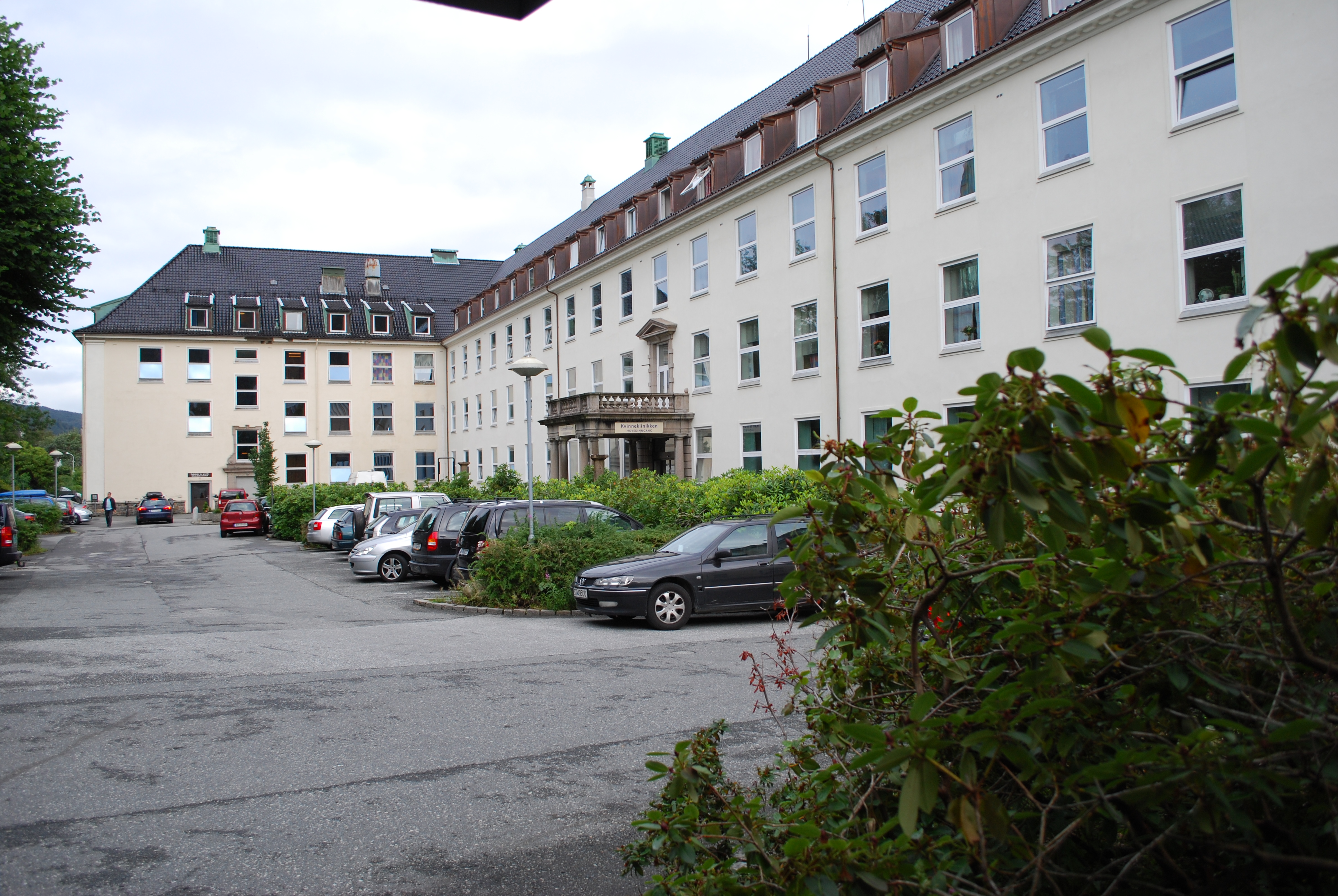 Description=Kvinneklinikken (Haukeland Universitetssykehus)